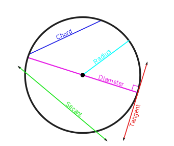 Snylyn